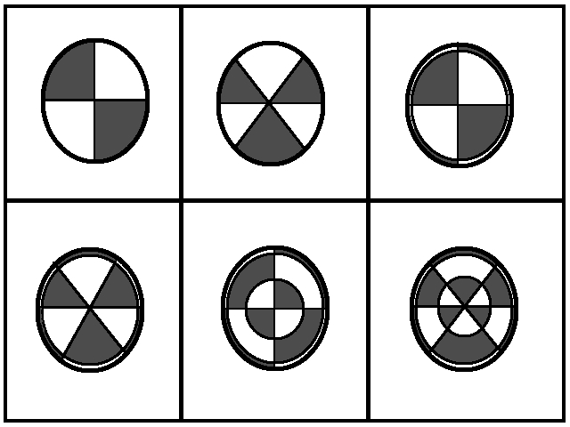 exemple de ligne nodale dans une cymbale